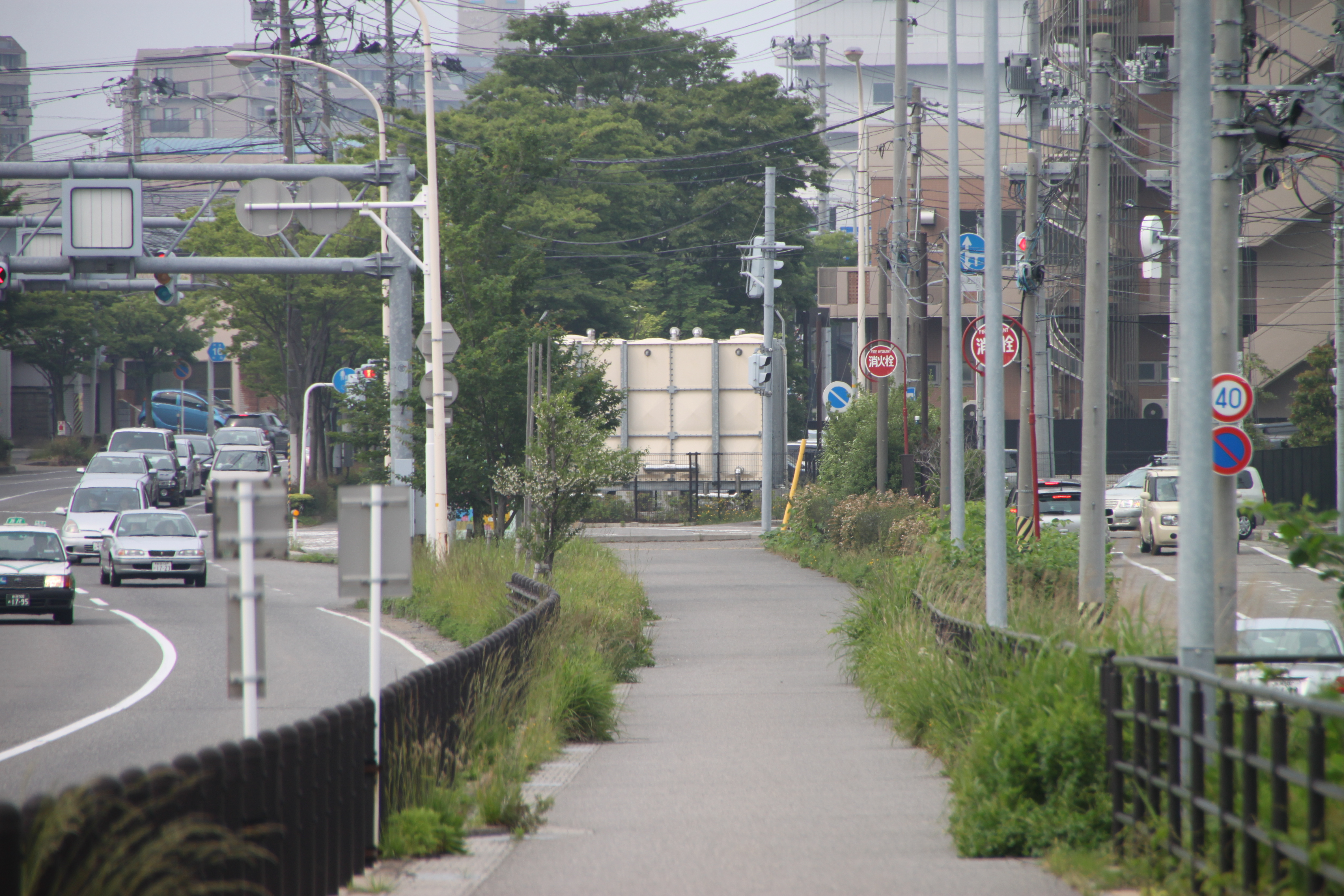 東関屋駅へのかつての進入口。歩道となった廃線跡からの遠望。正面には水タンク、周辺はマンション等が建ち、かつての面影はない。